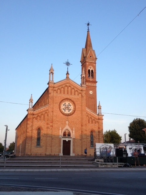 Musile di Piave, la chiesa parrocchiale di San Donato.